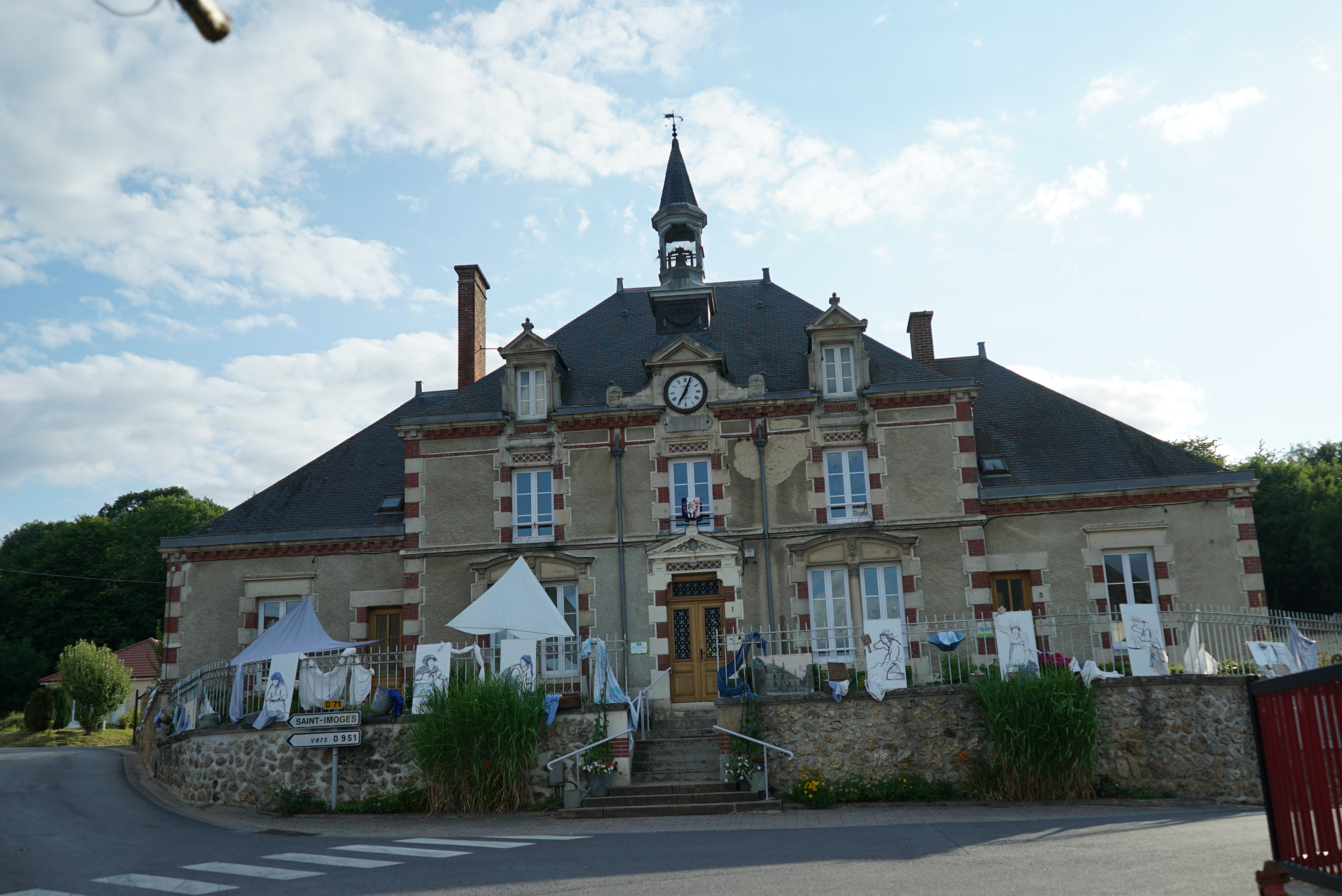 vue de Germaine.